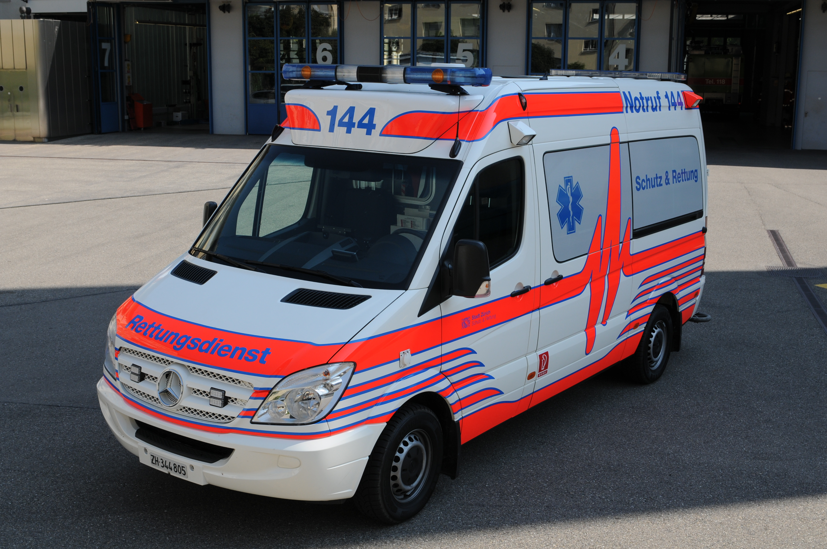 Einsatzambulanz des Rettungsdienstes von Schutz & Rettung Zürich, Schweiz.